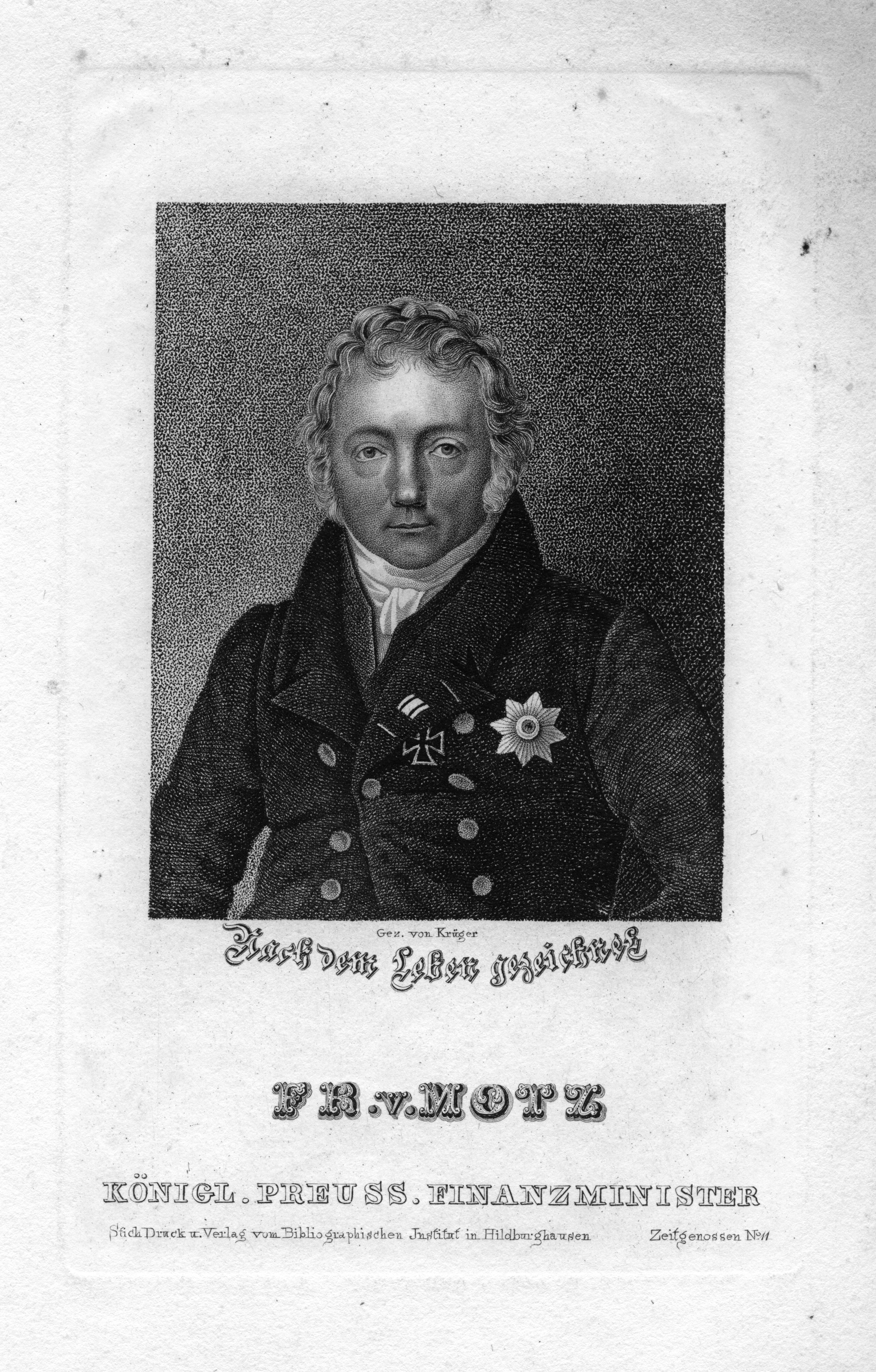 Friedrich von Motz, zeitgenössisches Portrait des 1830 verstorbenen preußischen Staatsmanns